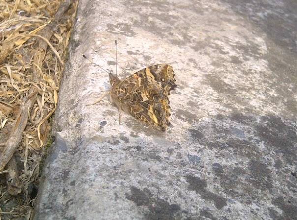 Plegada